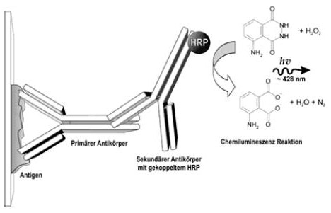 Schema der Immundetektion. Der primäre Antikörper bindet an sein Antigen, welches auf einer Membran fixiert ist. An diesen wiederum bindet der sekundäre Antikörper, der z. B. mit dem Enzym HRP gekoppelt ist. HRP katalysiert die Umsetzung von Luminol in seine oxidierte Form, dessen Chemilumineszenz detektiert werden kann.